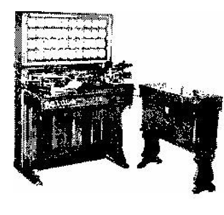 Makina e Holeritit